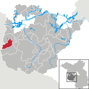 Buckautal in Brandenburg (Country) - District Potsdam-Mittelmark